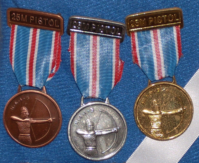 NAIS-medaljer, bronse sølv og gull